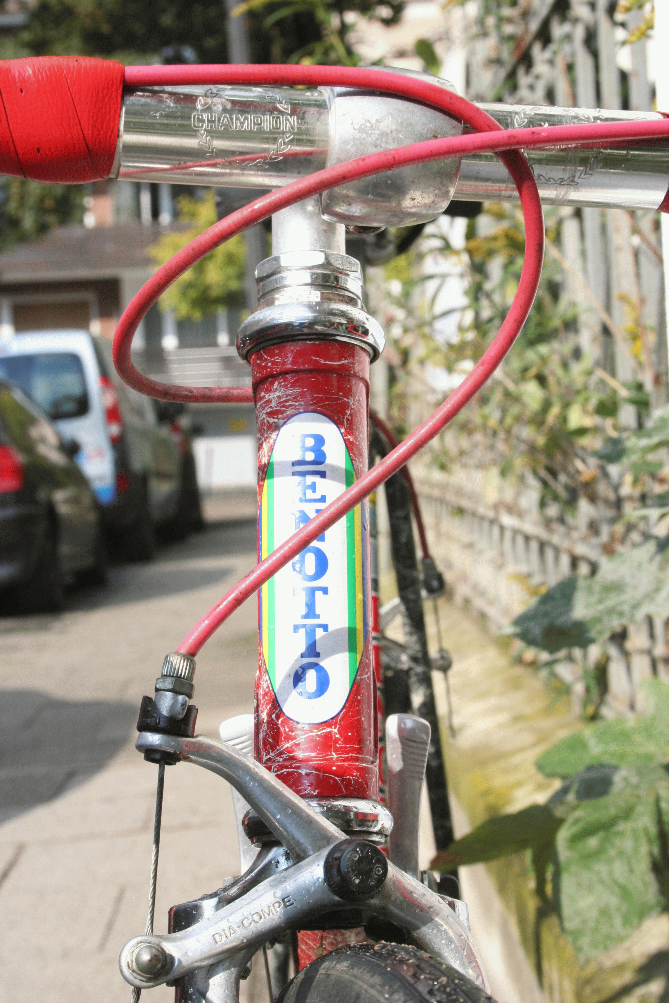 Benotto brand at a racingcycle